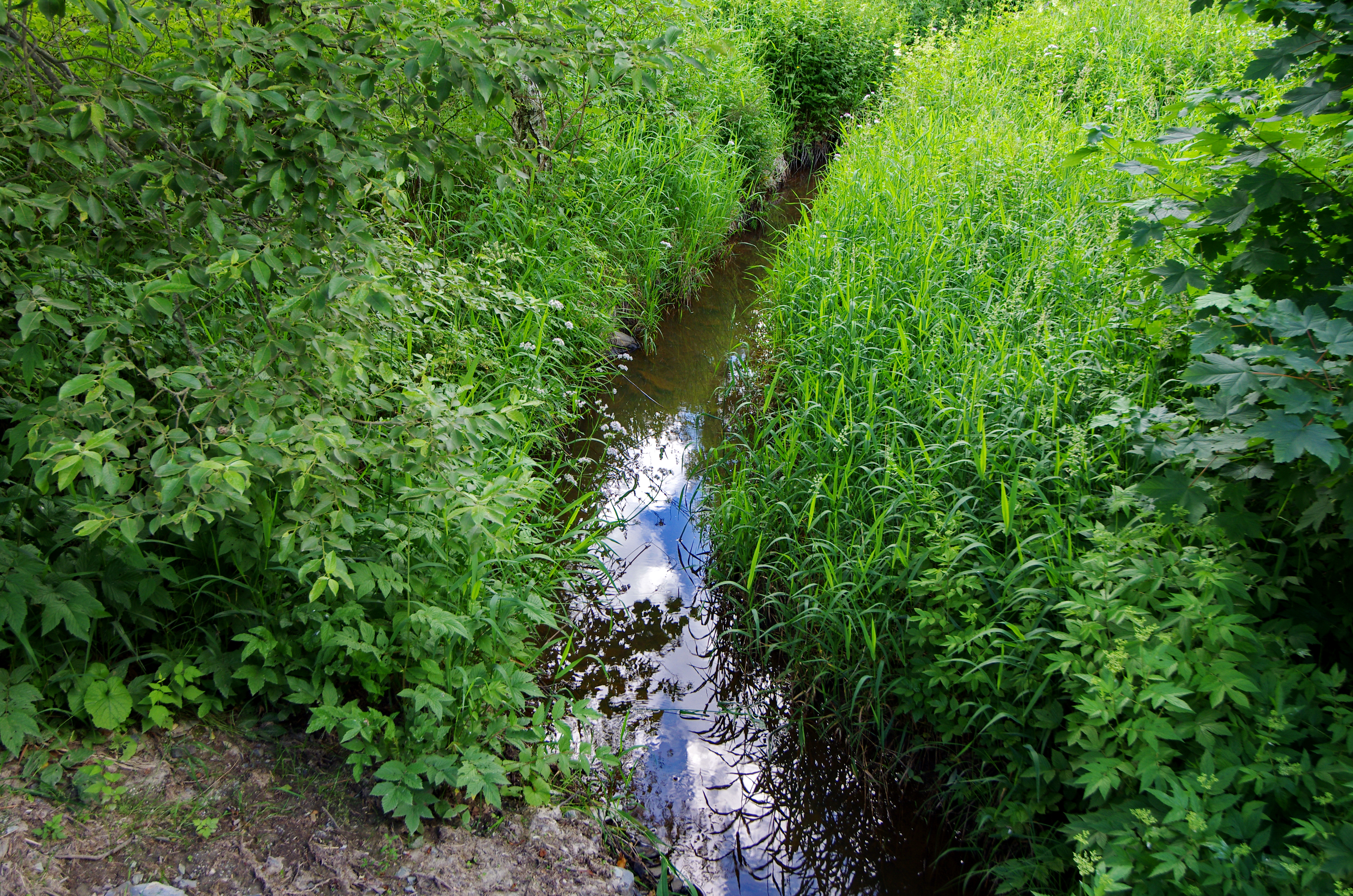 Potok Zadní Liboc (přítok Libockého potoka) v osadě Kostelní, okres Sokolov